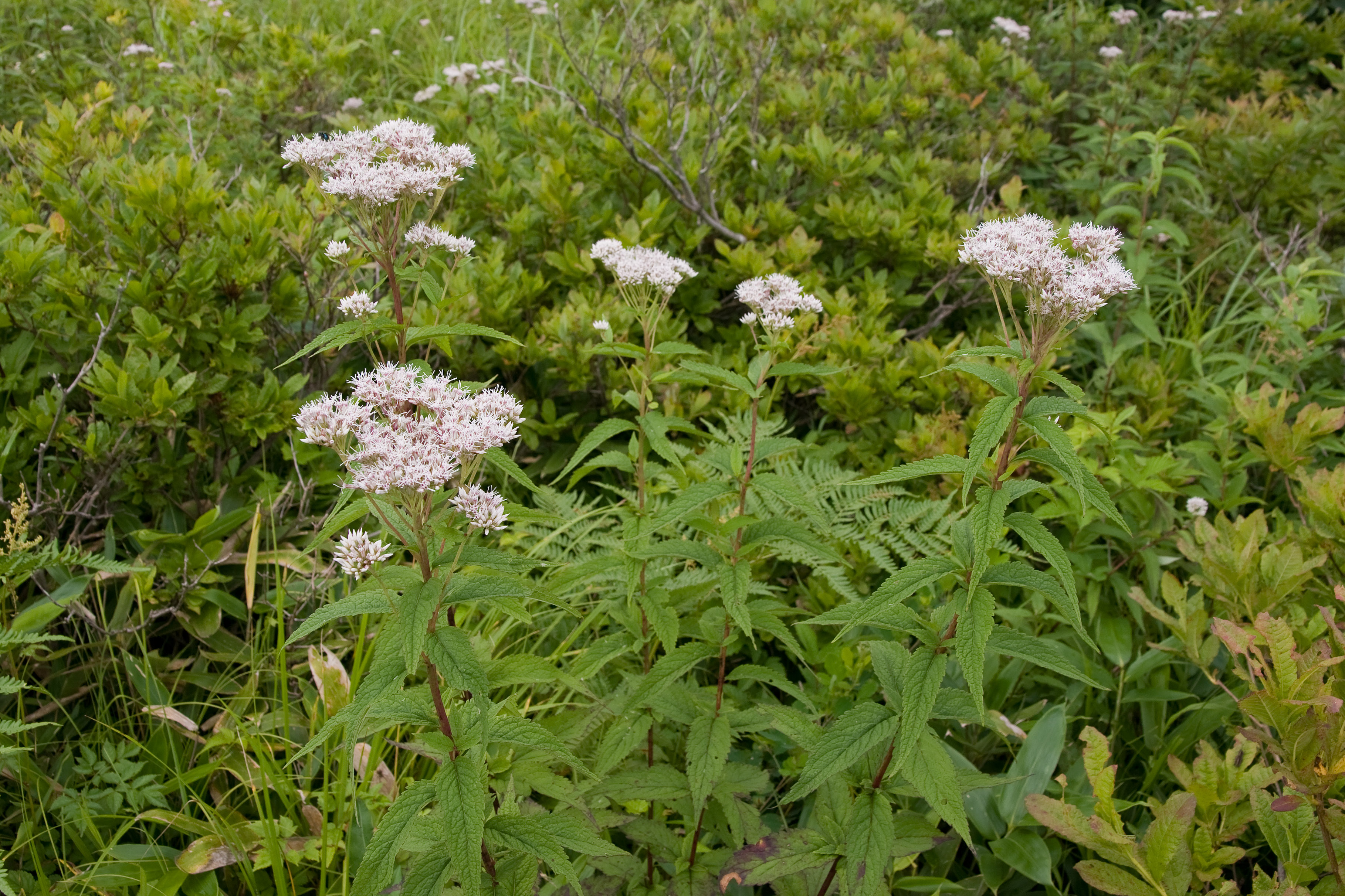 ヨツバヒヨドリ (学名:Eupatorium chinense var. sachalinense)